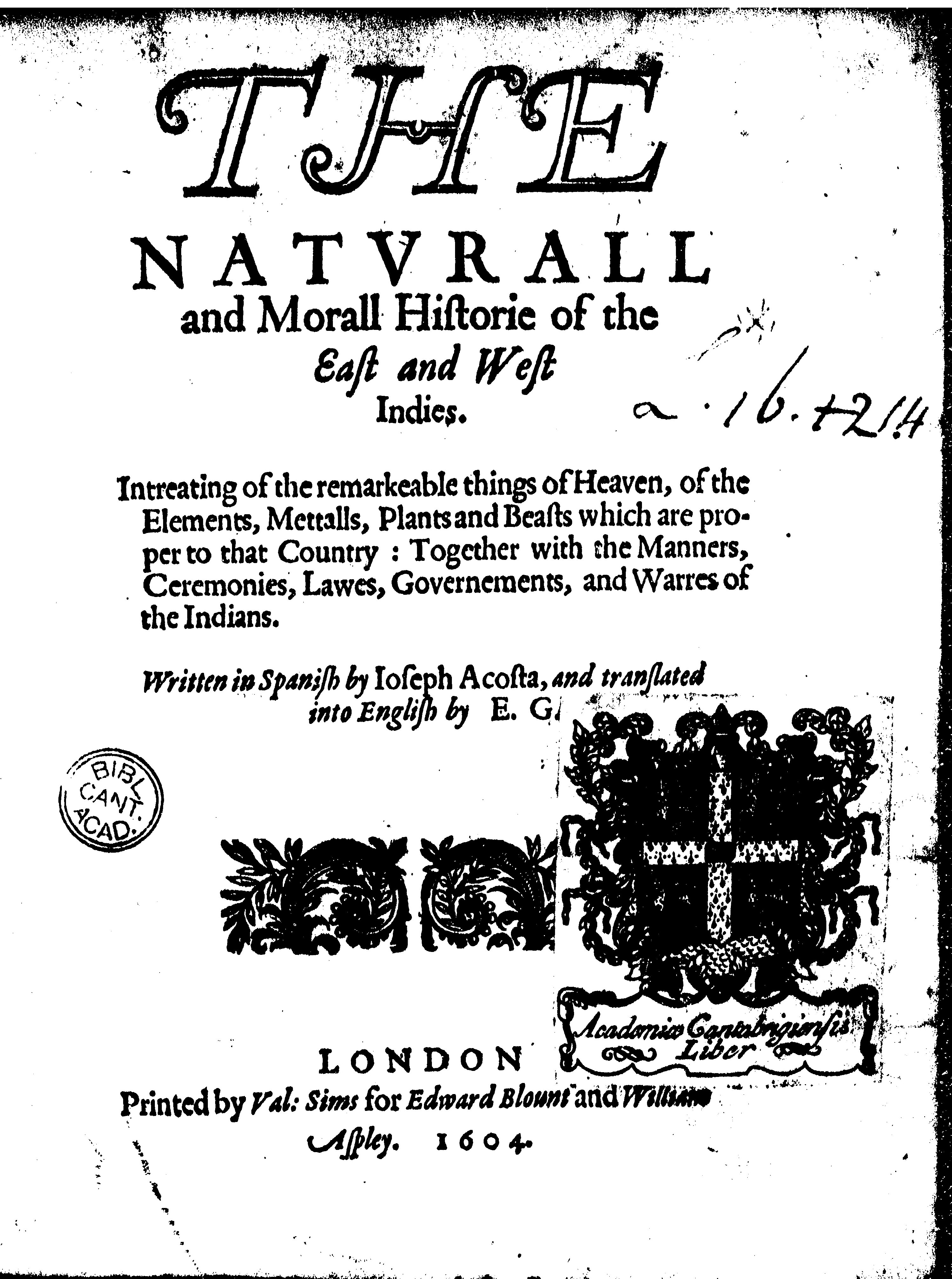 Portada del libro Historia Natural y Moral de las Indias de José de Acosta, en inglés